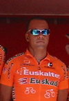 Euskaltel-Euskadi, Euskal Bizikleta 2005